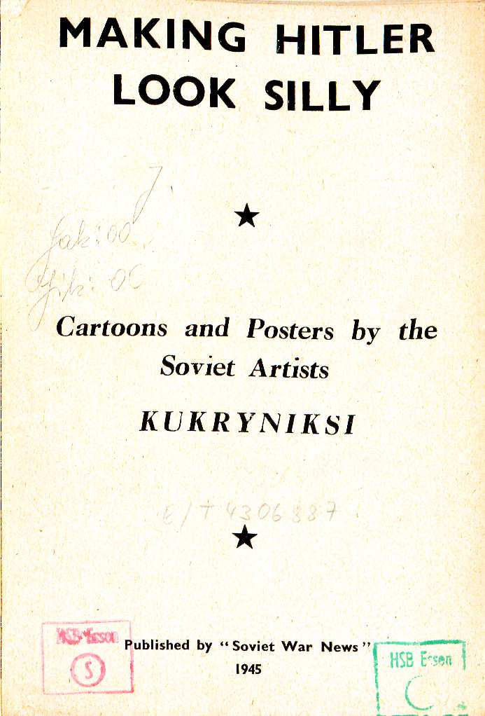 Making Hitler look silly : Cartoons and posters by Kukryniksy. Einleitung Elena Kuznetsova. London : Soviet War News, 1945